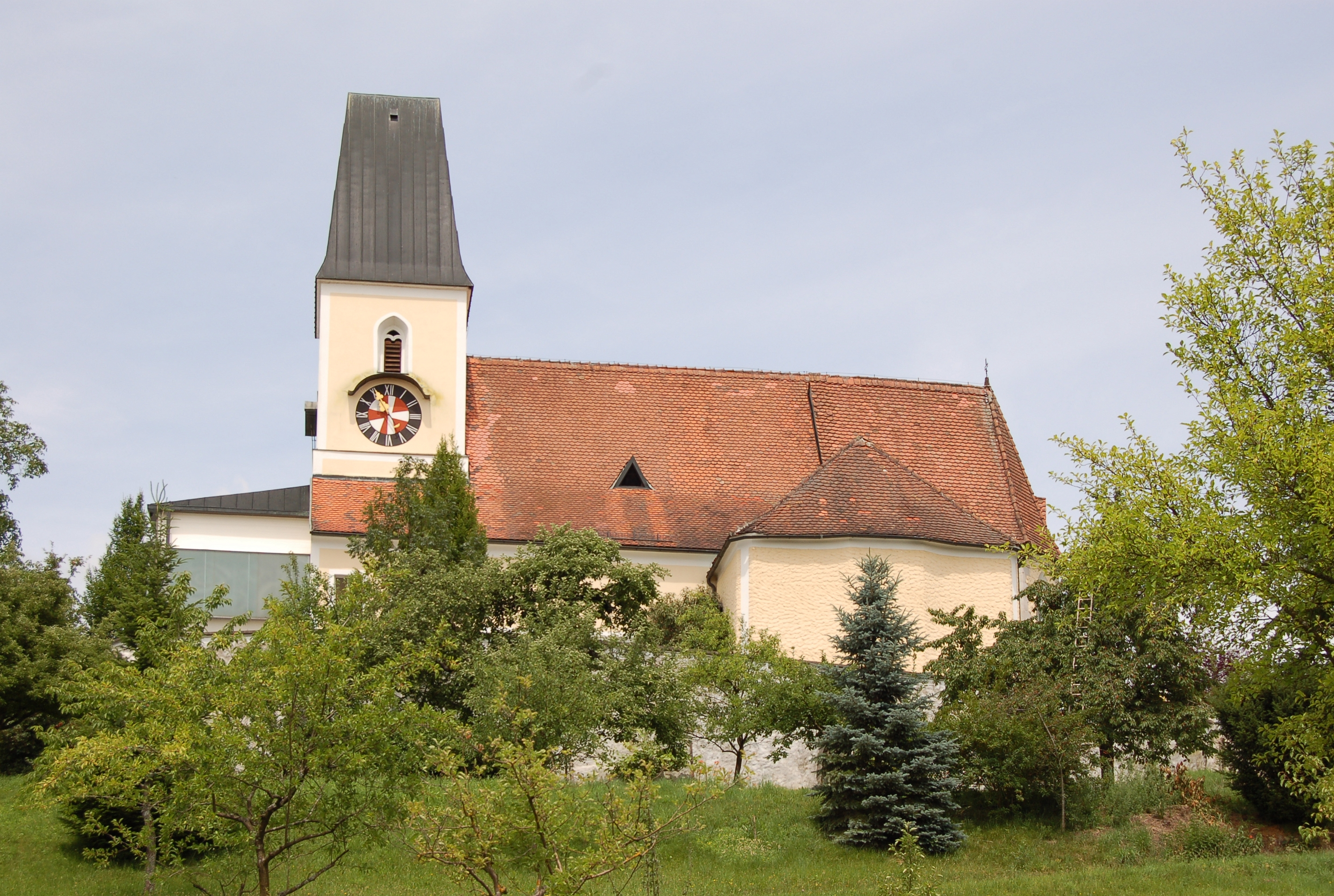 Die Pfarrkirche zum heiligen Martin in Walding (Oberösterreich).